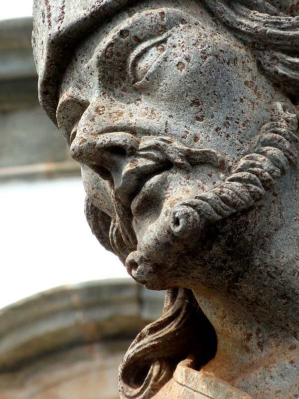 Profeta Ezequiel - Doze profetas de Aleijadinho Congonhas Minas Gerais